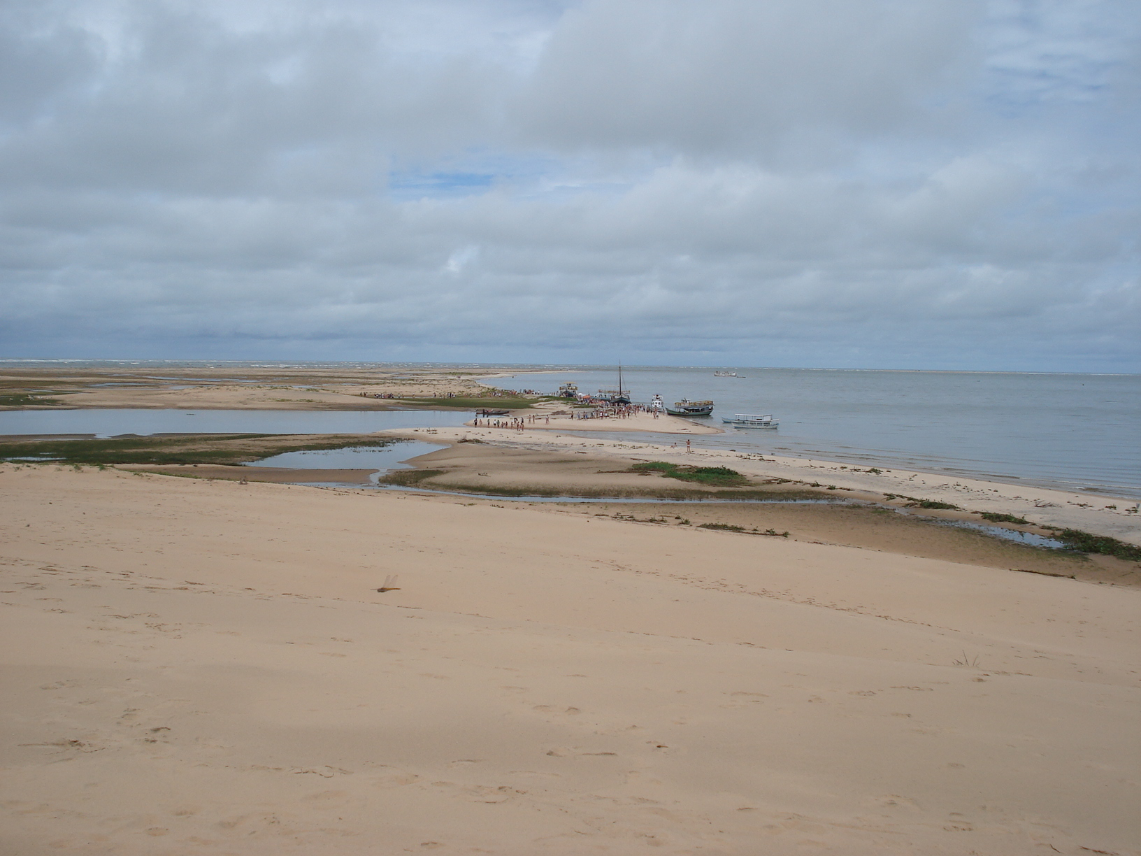 Foz do Rio São Francisco, em Alagoas.